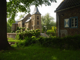 Asselt, St.-Dionysiuskerk